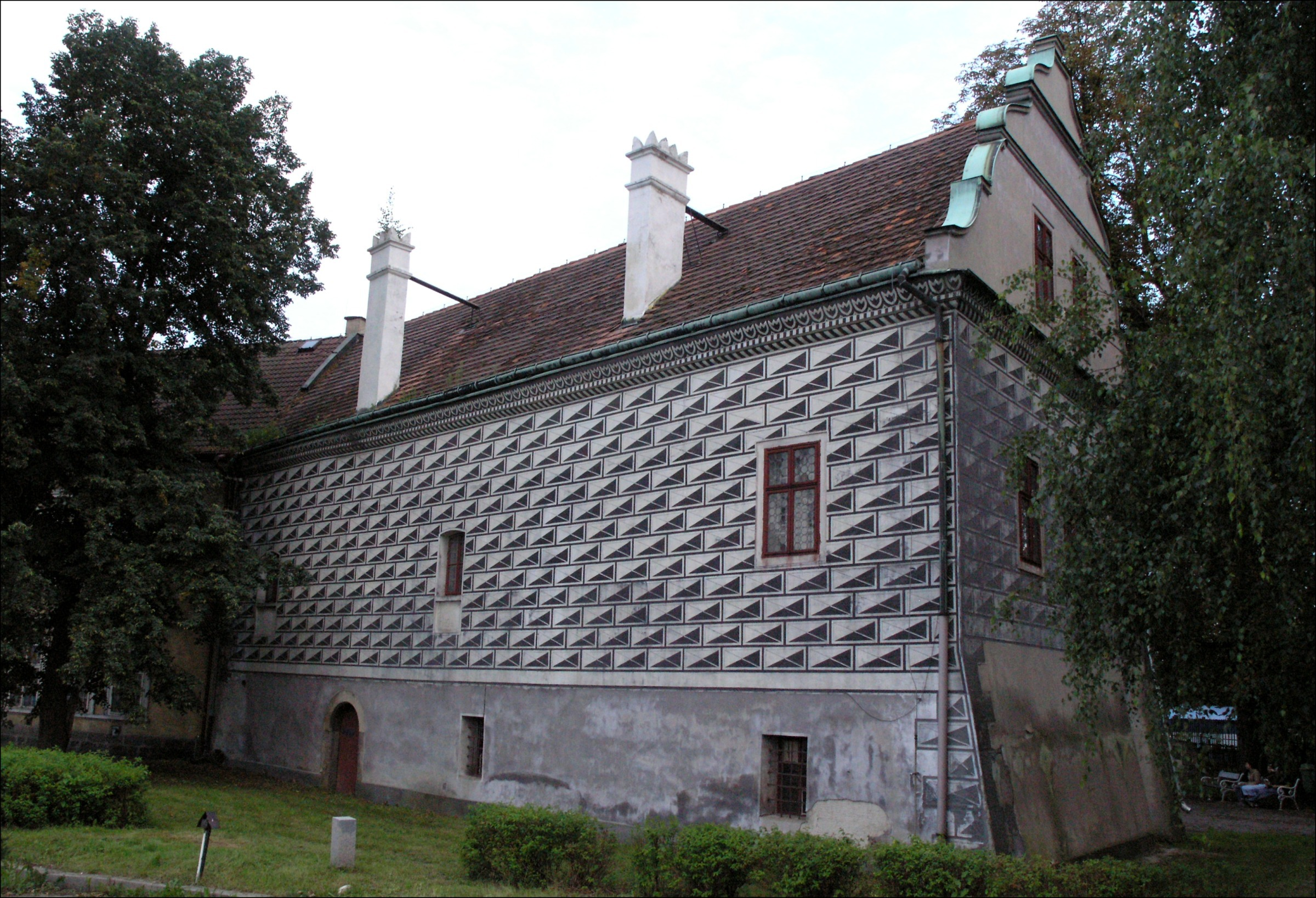 Česká Lípa - renesanční letohrádek Červený dům